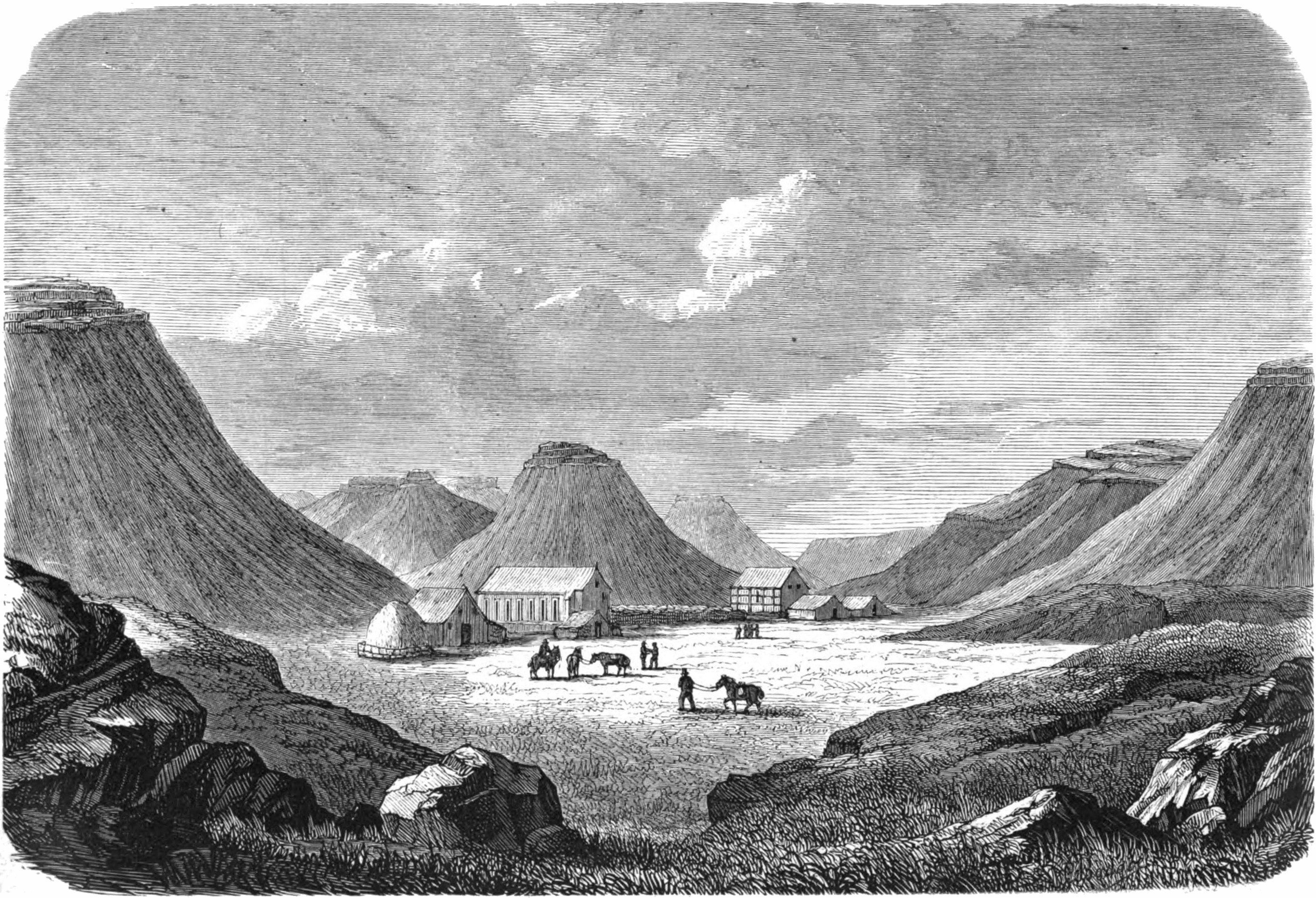 Det gamle islandske bispesæde Hólum i Hjaltadal, fra Nordiske Billeder, fjerde bind. København 1870.